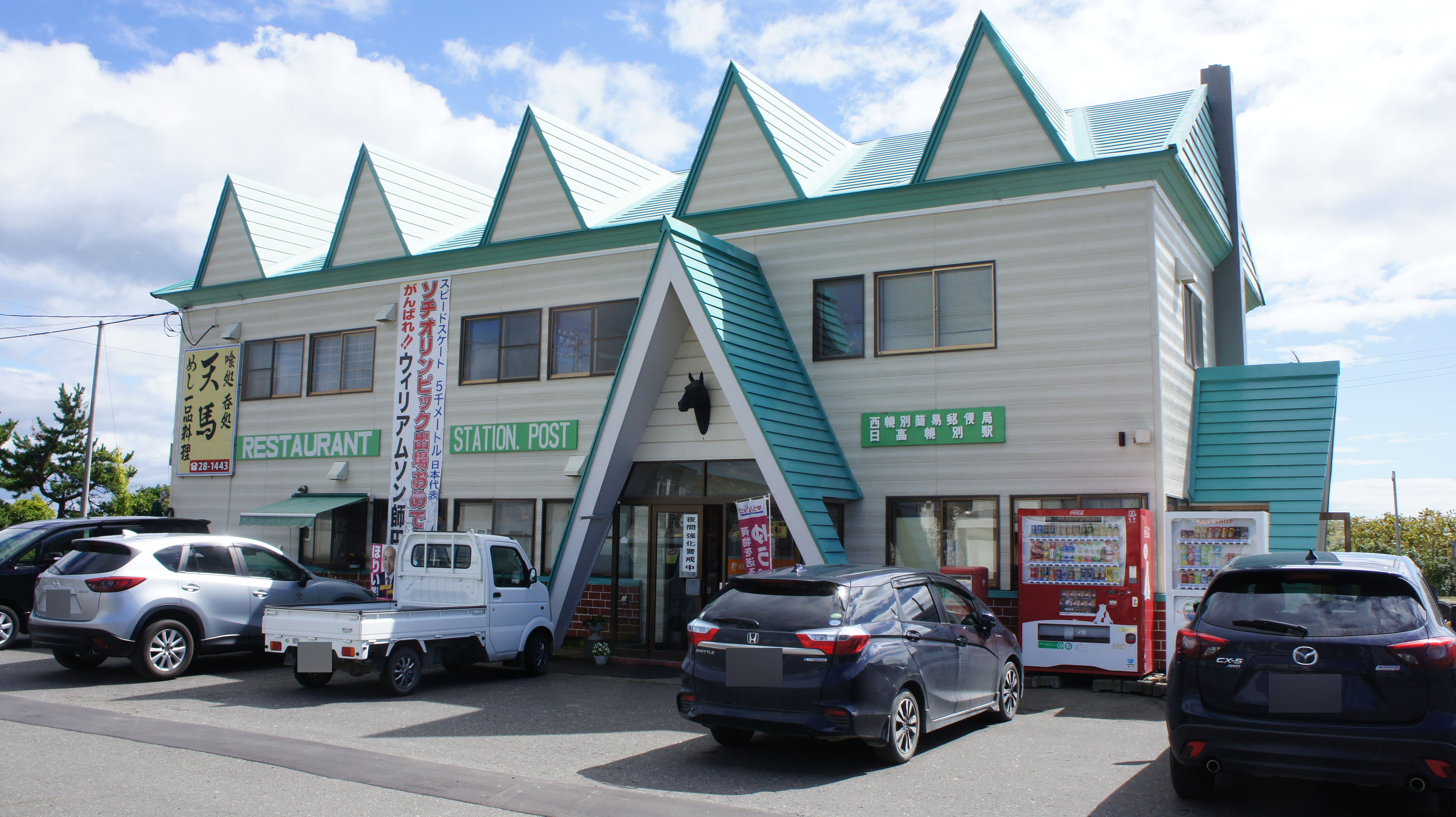 JR日高本線・日高幌別駅の駅舎